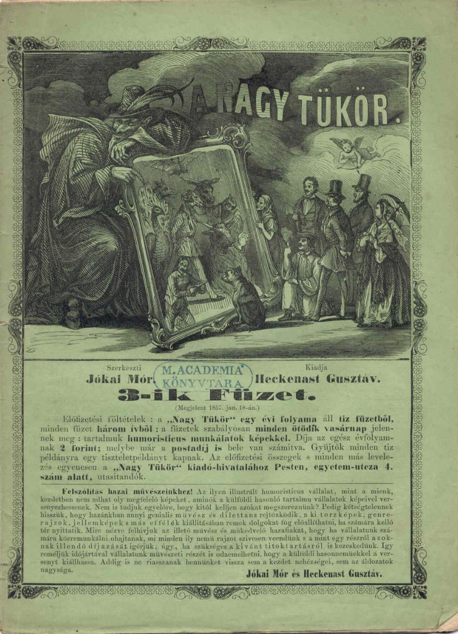 Jókai Mór A Nagy Tükör című lapjának borítója, 1857-es szám